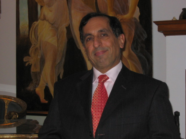 Jacques Chaoulli, né en France en 1952, est un médecin et militant libéral français célèbre pour avoir obtenu un jugement favorable contestant la légitimité du système d'assurance santé monopolistique national canadien.